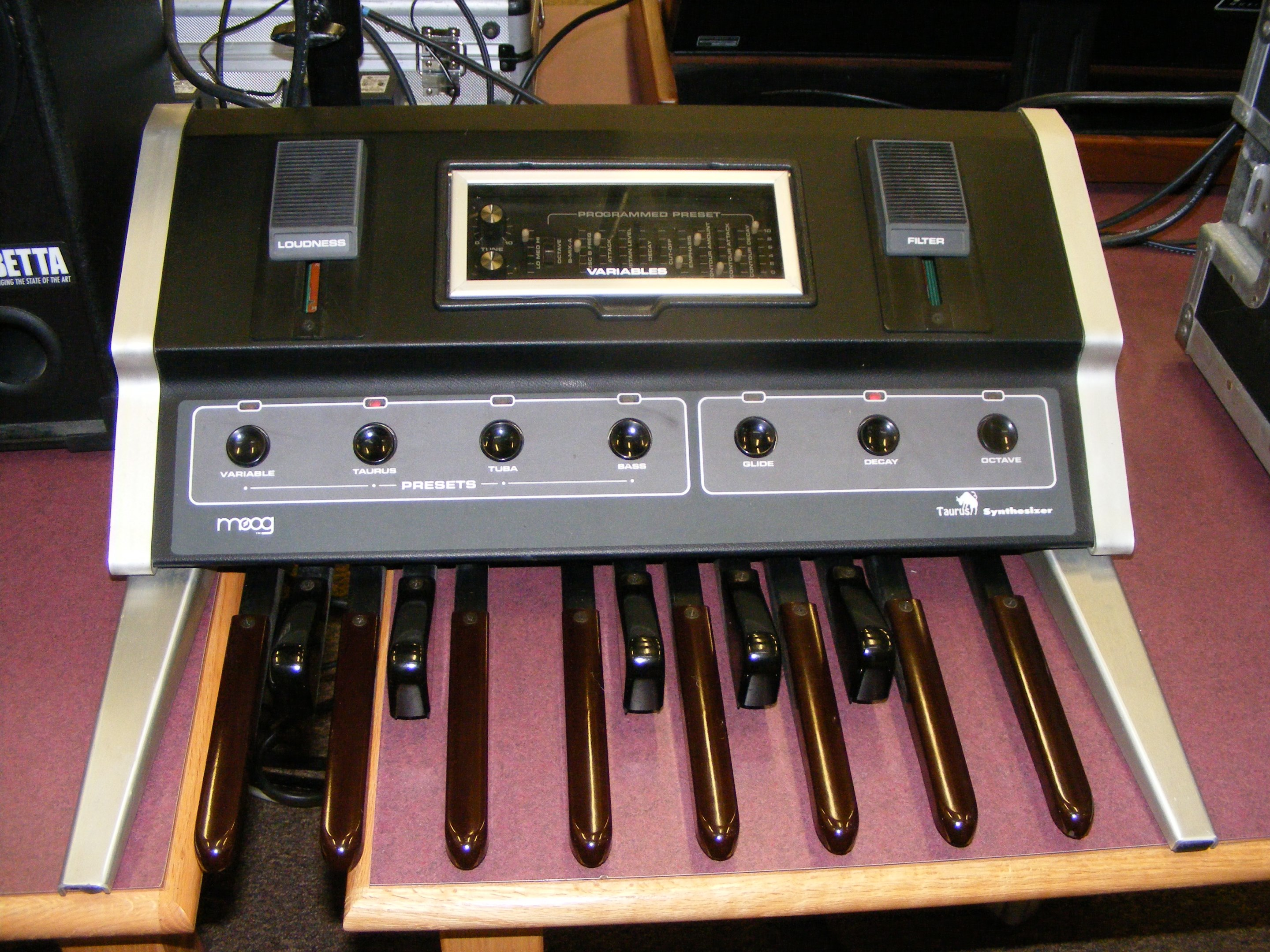 Taurus Pedals